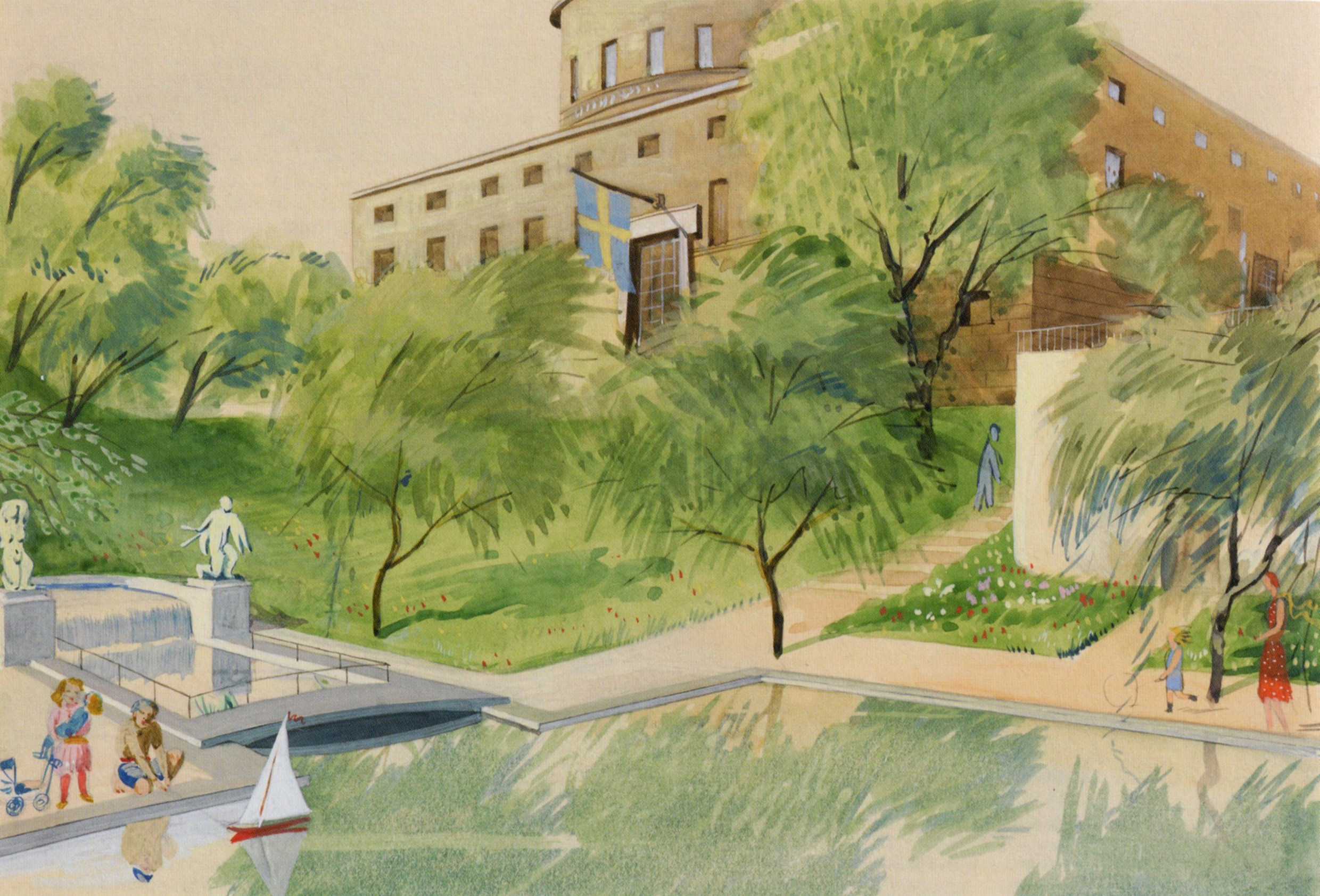 Gunnar Asplunds perspektivskiss över Stockholms stadsbibliotek och Observatorielunden